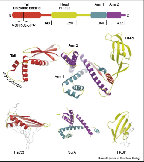 Struttura del tf